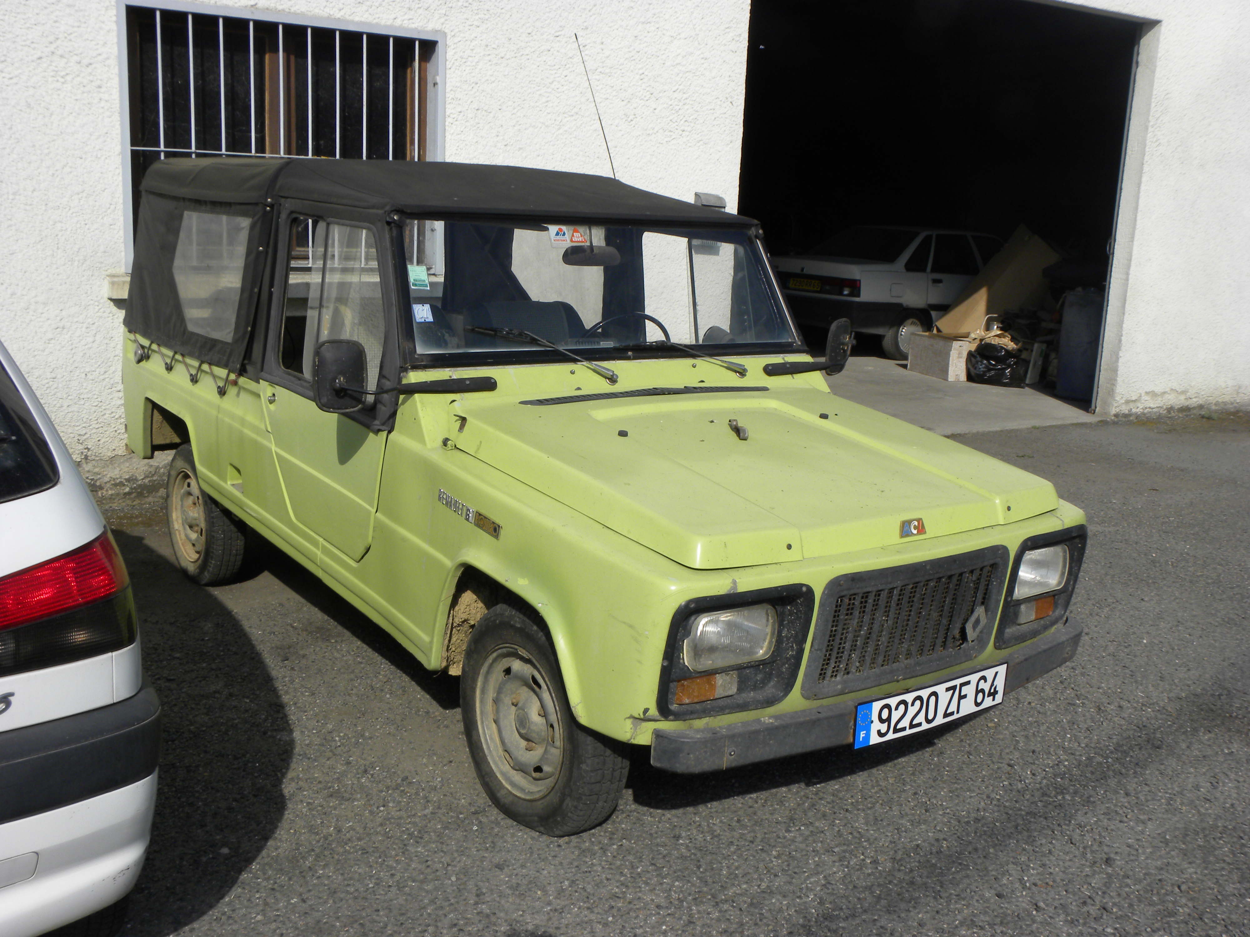 Renault Rodeo 6